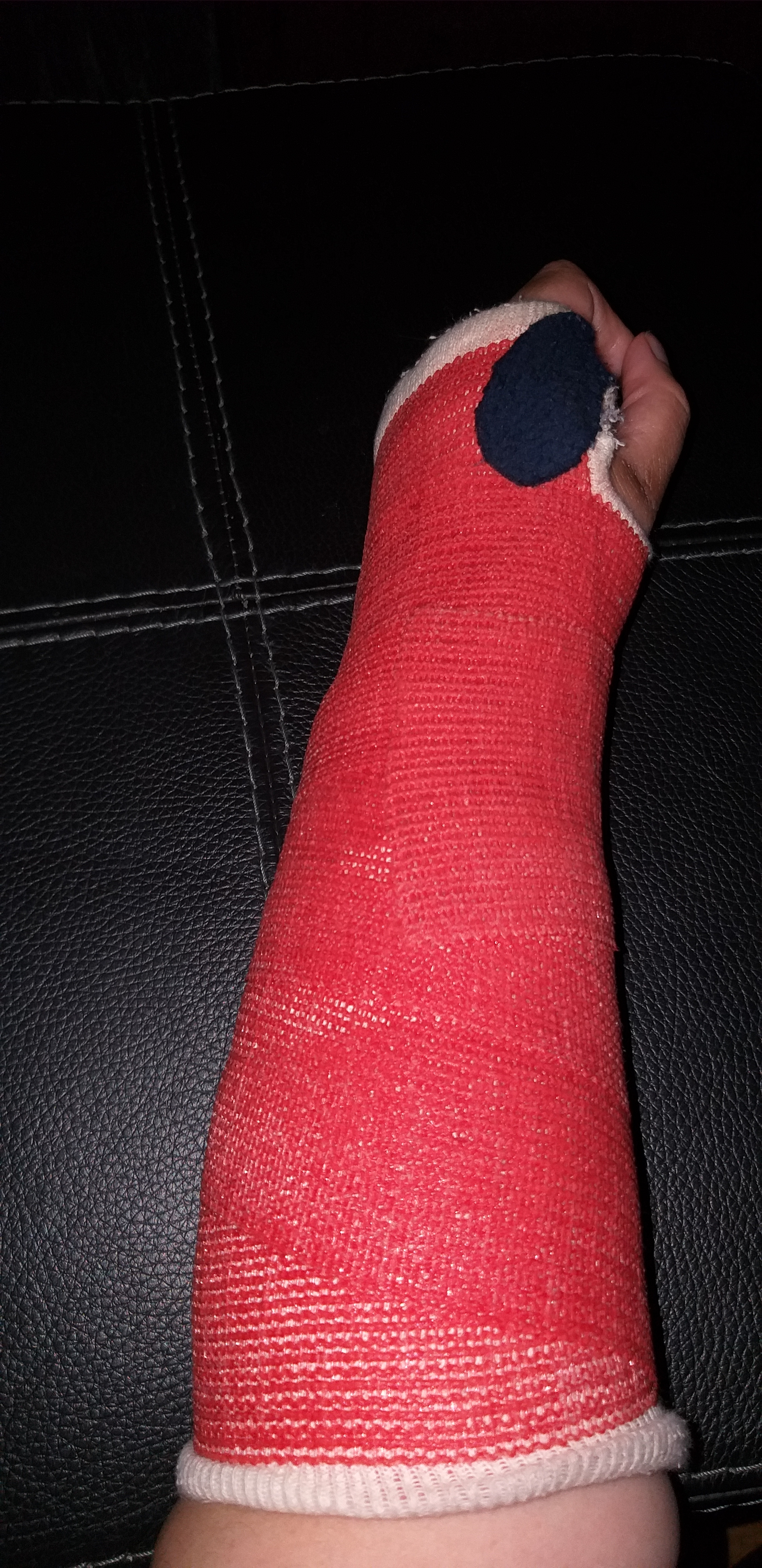 Een gebroken pols in een gipsverband